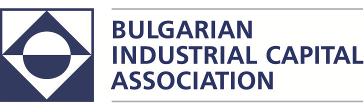 Английски превод на името на организацията